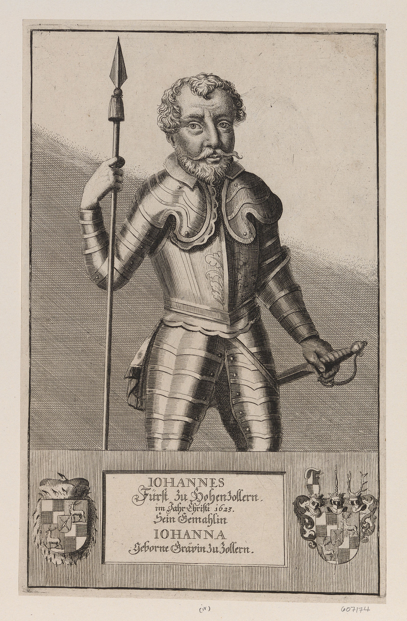 Jean de Hohenzollern